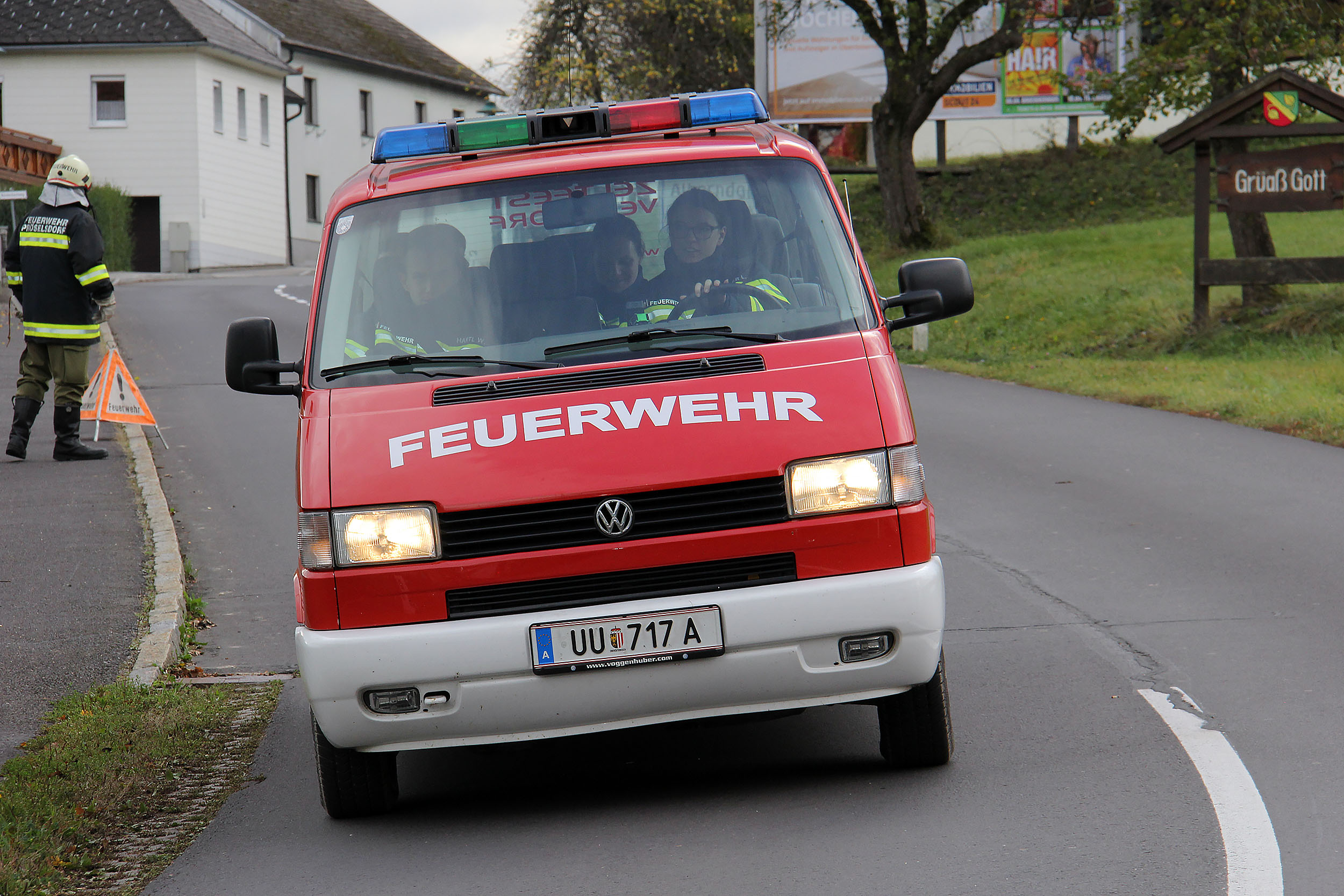 Übung zur Erreichung der Bezirksleistungsplakette der FF Pröselsdorf im Mühlviertel